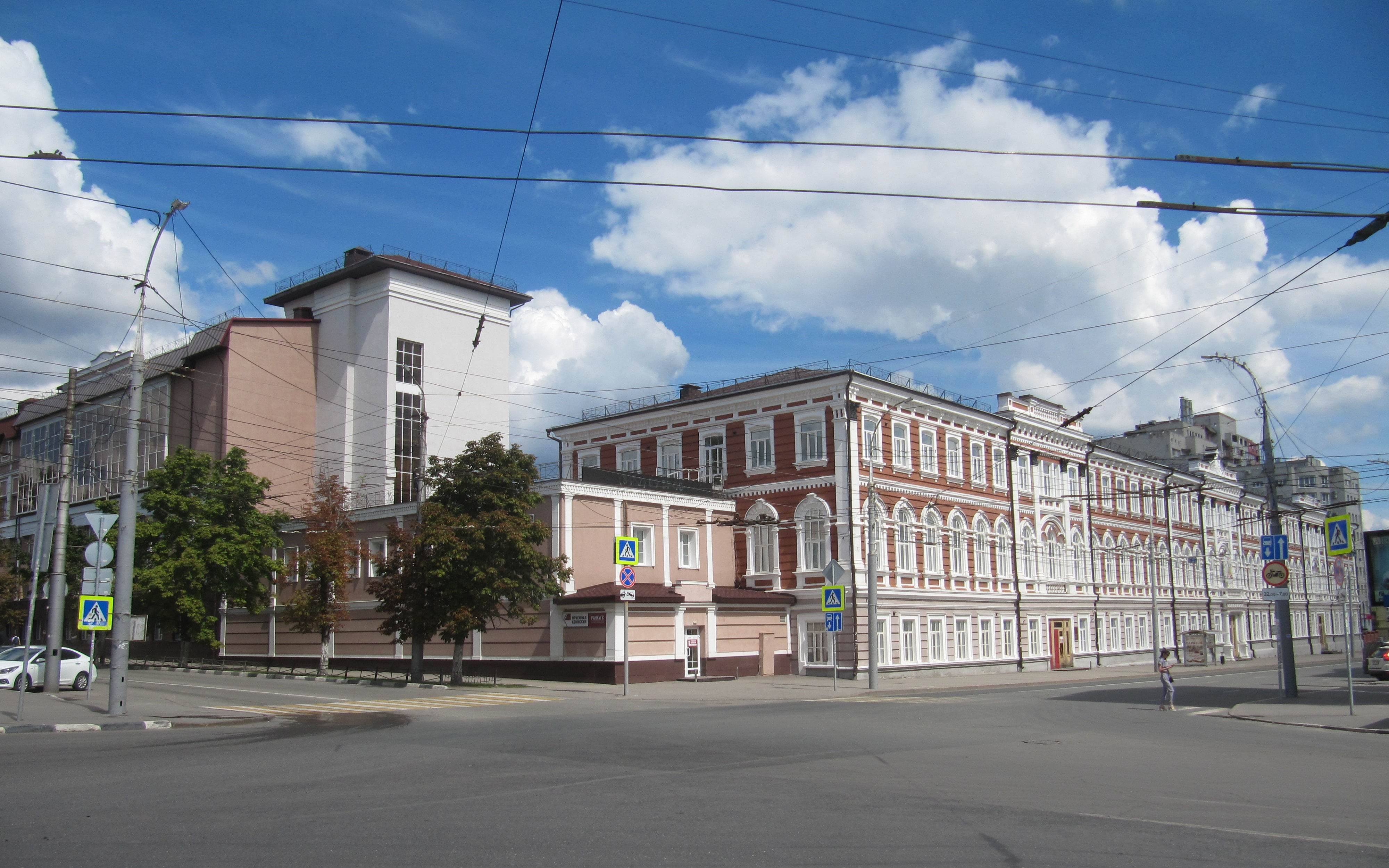 Поволжский Институт Управления имени П.А. Столыпина (филиал РАНХиГС): ул. Московская 164, угол ул. Аткарская 68, Саратов.